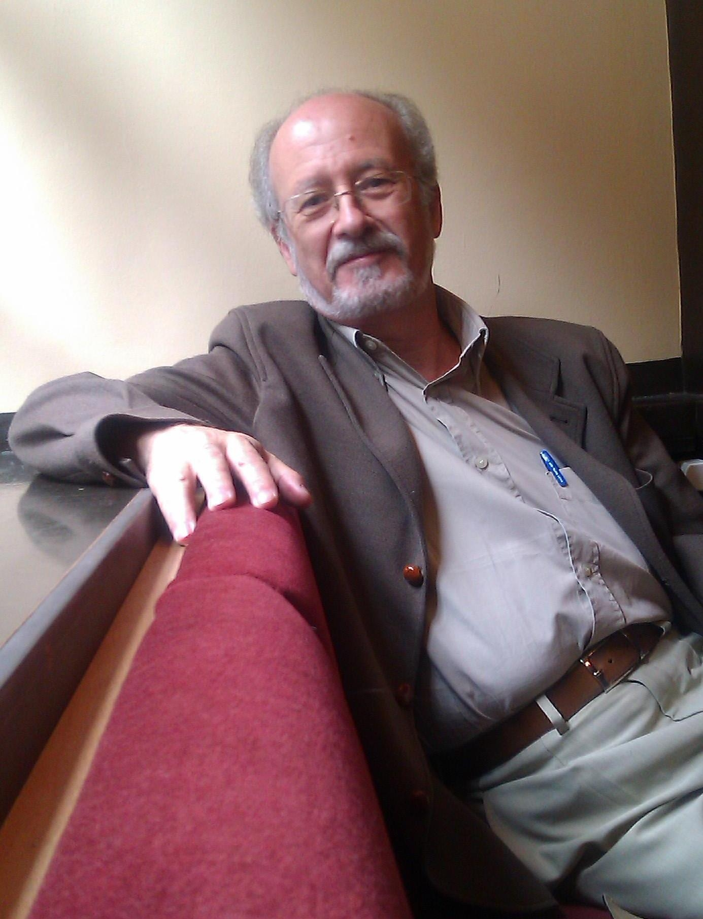 José Luis Turina (foto: Pilar Sanz, 2012)